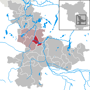 Märkisch Buchholz in Brandenburg (Country) - District Dahme-Spreewald